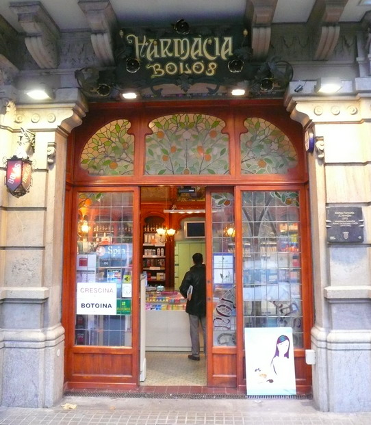 Antiga farmàcia Novellas, del farmacèutic Antoni Novellas i Roig i l'arquitecte Antoni de Falguera i Sivilla, a la rambla de Catalunya de Barcelona